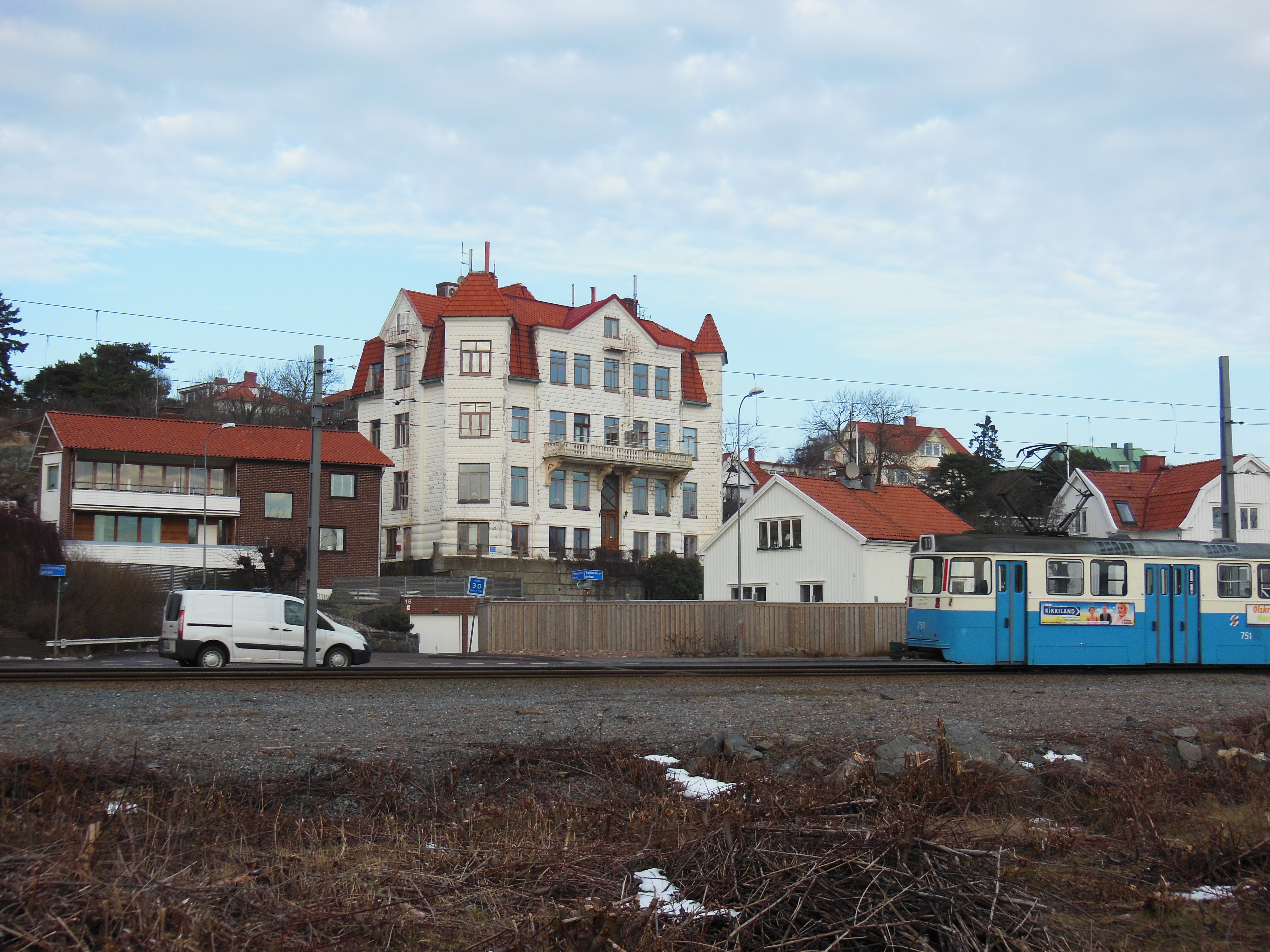 "Bagarens hus" på Palmsundsgatan 20 i Långedrag, Göteborg.